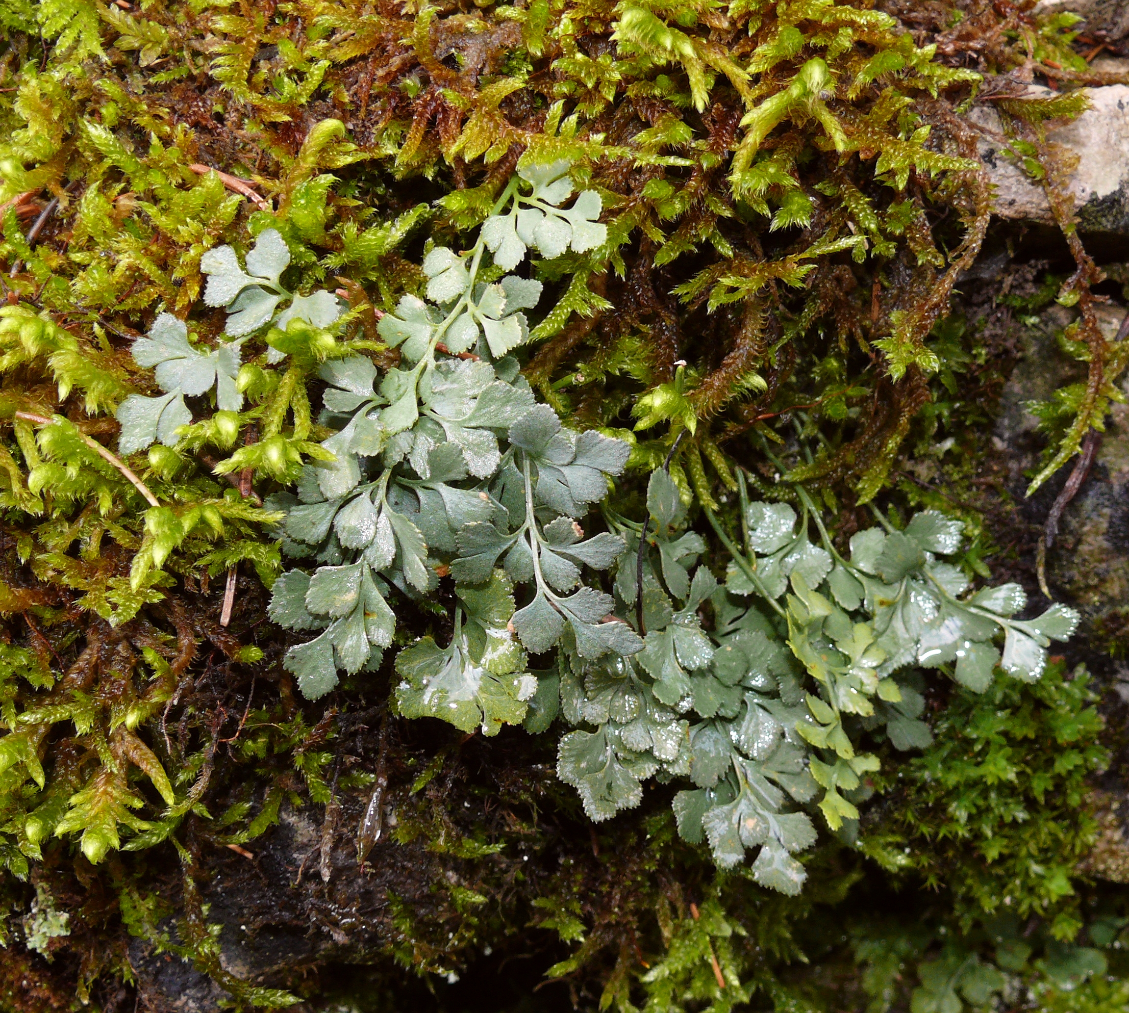 Asplenium ruta-muraria, Tauberland, Germany